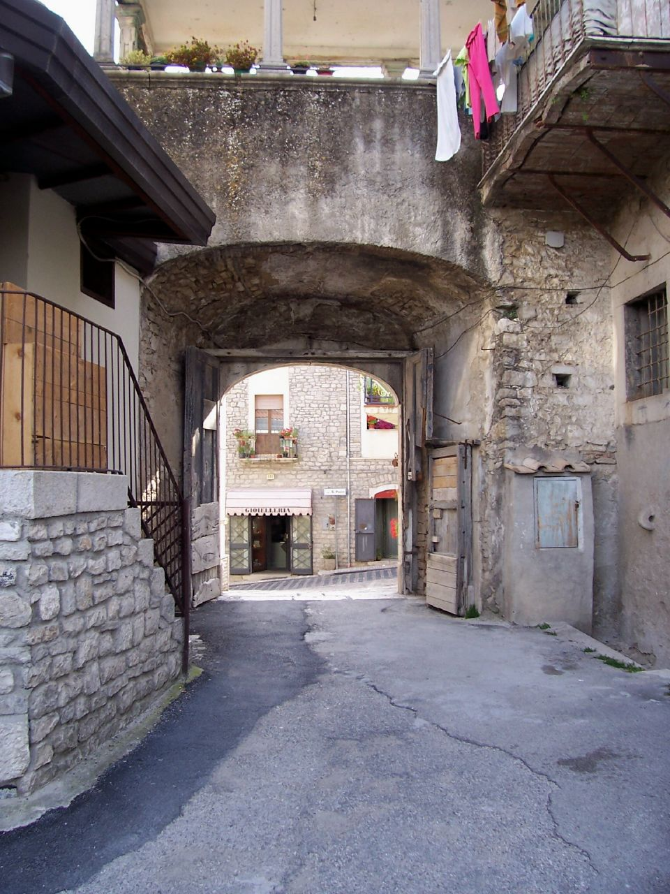 Pietrelcina, Benevento, Campania, Italy